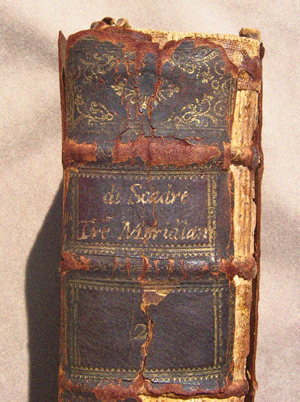 Image of spine of "Tre Meridiani" (music collection) by Di Scadre (1599)